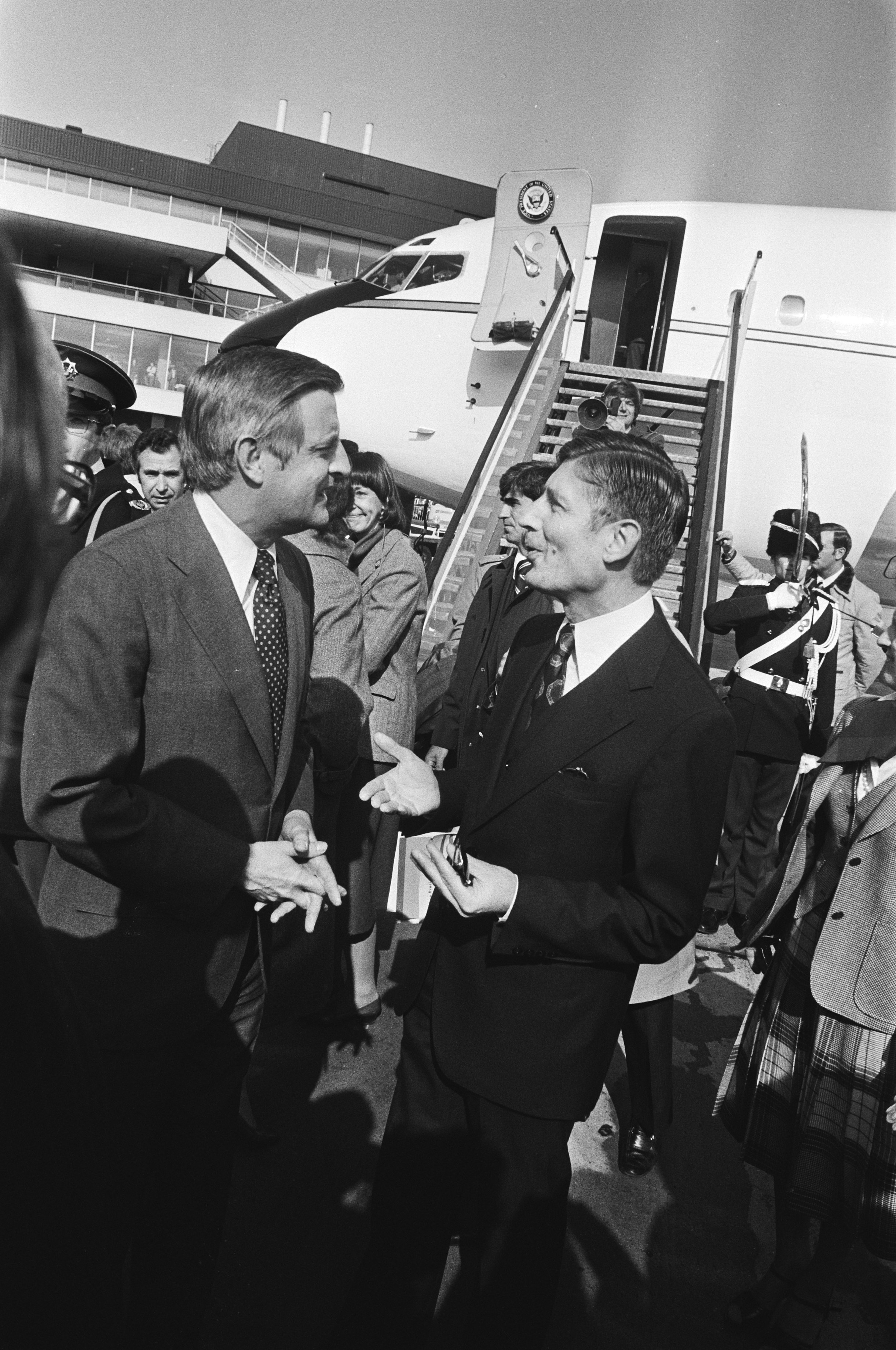 Collectie / Archief : Fotocollectie Anefo Reportage / Serie : Amerika's vice president Walter Mondale een dag in Nederland Beschrijving : Mondale en van Agt Datum : 21 april 1979 Trefwoorden : groepsportretten, politici, premiers Persoonsnaam : Agt, Dries van, Mondale, Walter Fotograaf : Bogaerts, Rob / Anefo Auteursrechthebbende : Nationaal Archief Materiaalsoort : Negatief (zwart/wit) Nummer archiefinventaris : bekijk toegang 2.24.01.05 Bestanddeelnummer : 930-2245